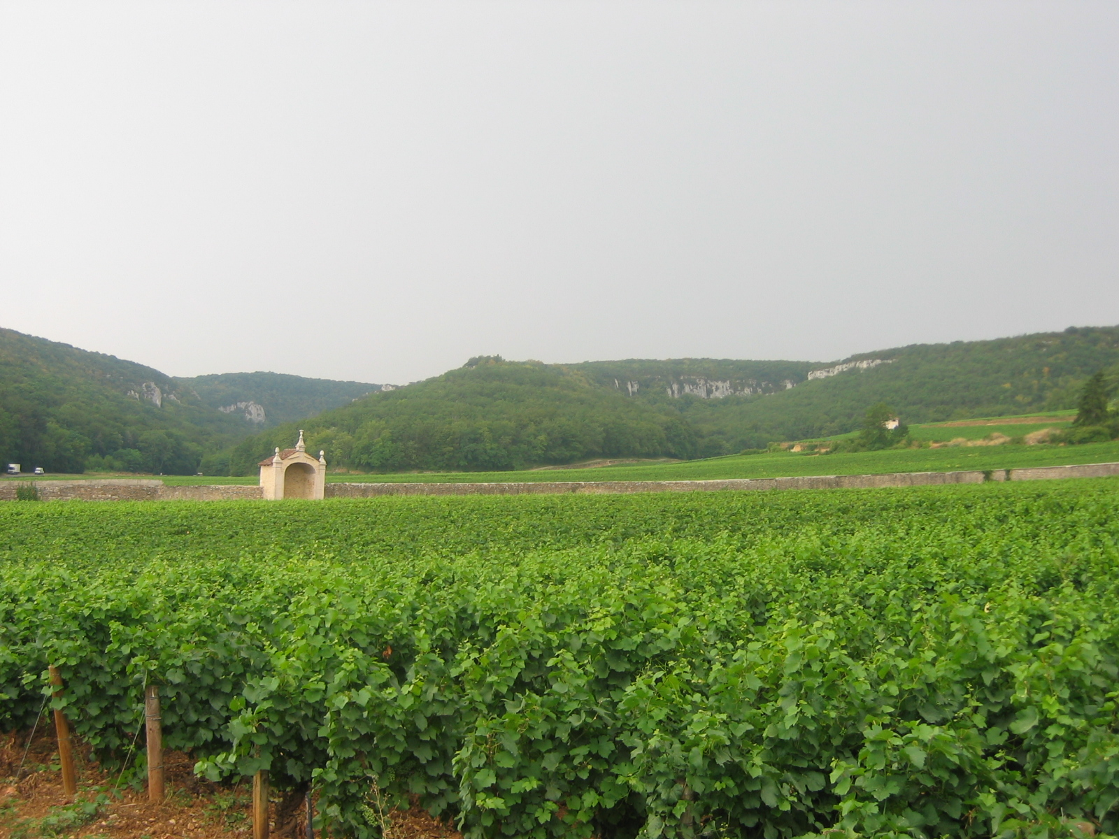 Vignoble de Gevrey-Chambertin, combe de Lavaux au fond à gauche, Bourgogne, France.